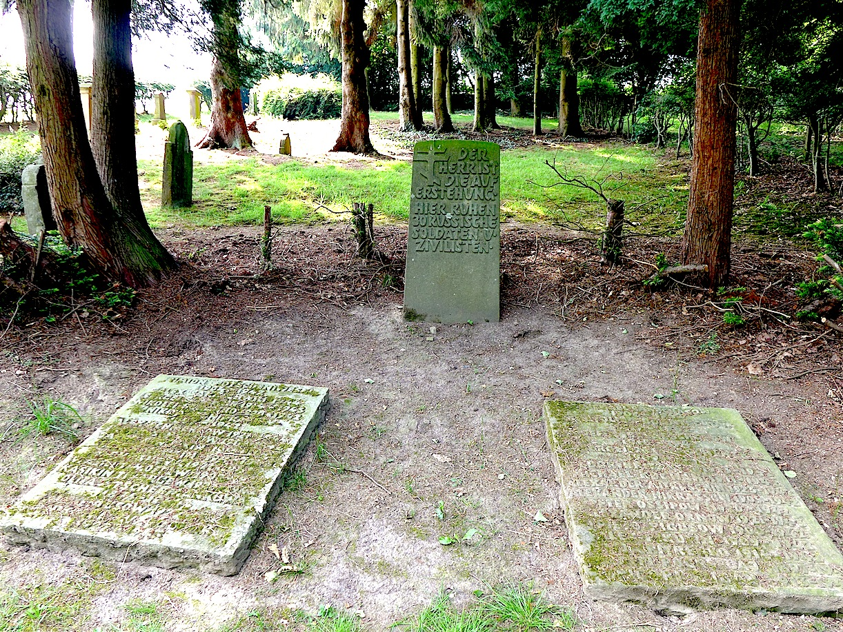 Старое евроейско кладбище в Невигесе, Фельберт, Германия.